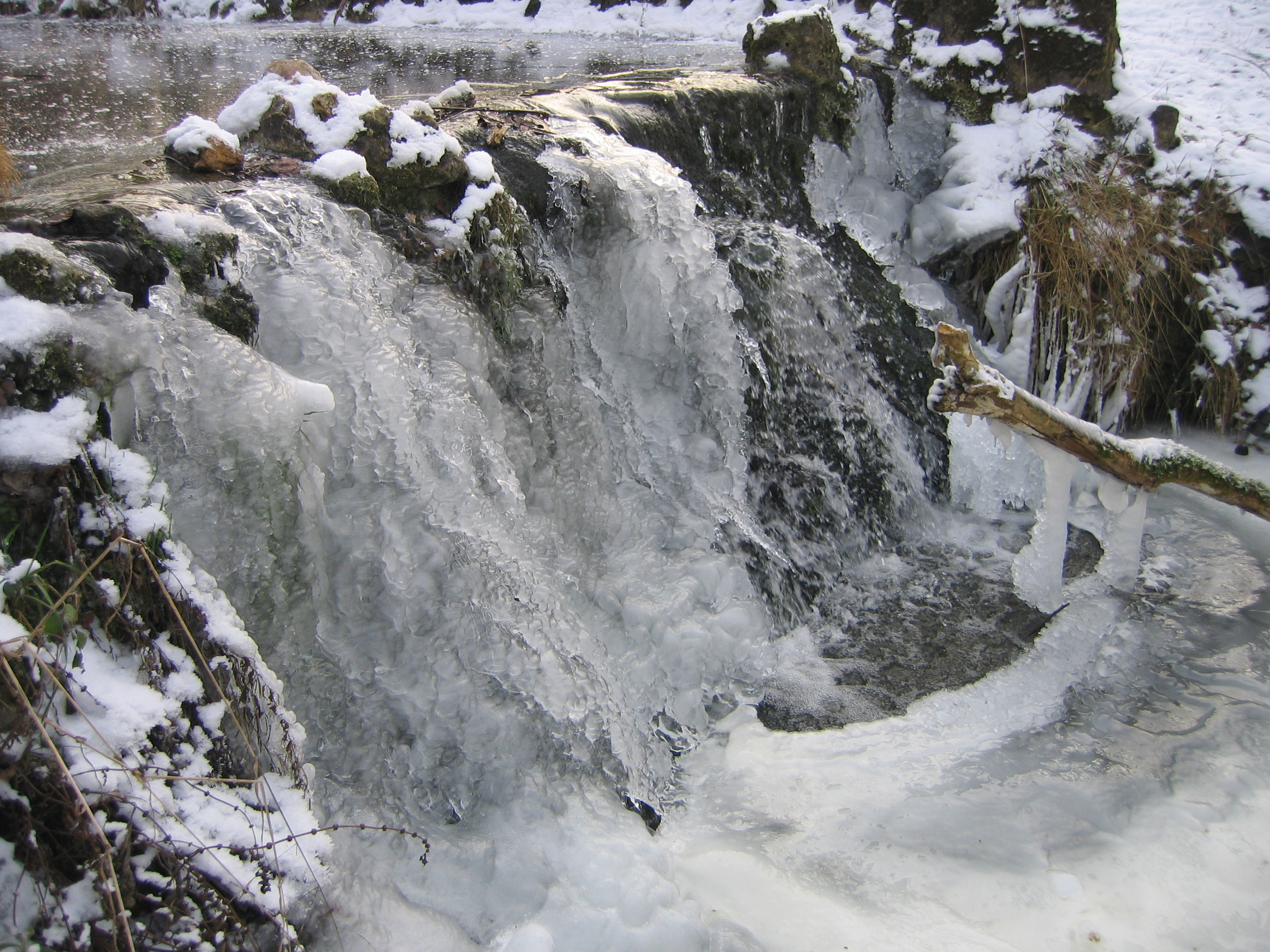 Une cascade gelée au bois de Vincennes.